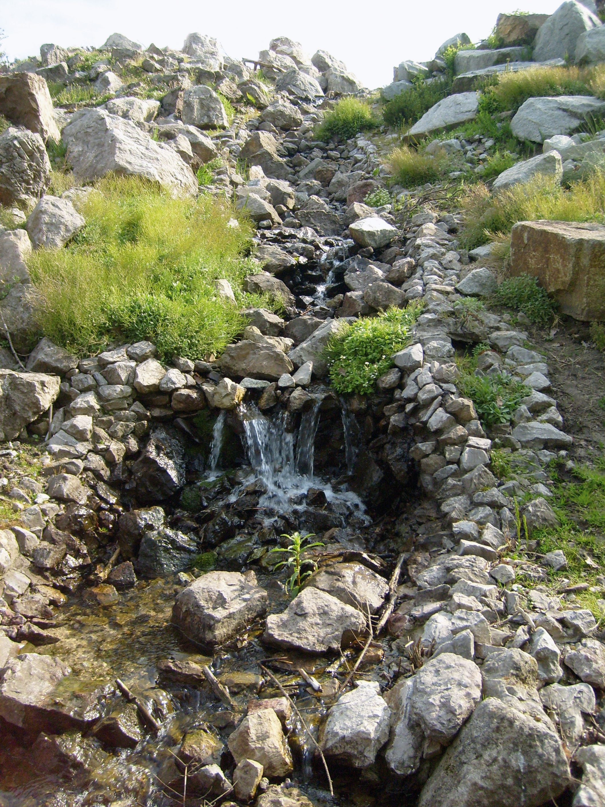 Ogród Botaniczny PAN w Powsinie Botanical Garden in Powsin. Warsaw